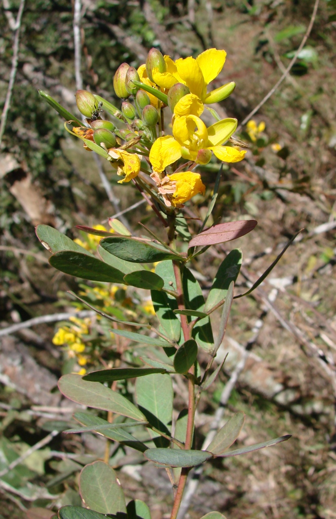 Chamaecrista conferta (Benth.) H.S. Irwin & Barneby - FABACEAE - Jardim Botânico de Brasília - Distrito Federal - Brasil.